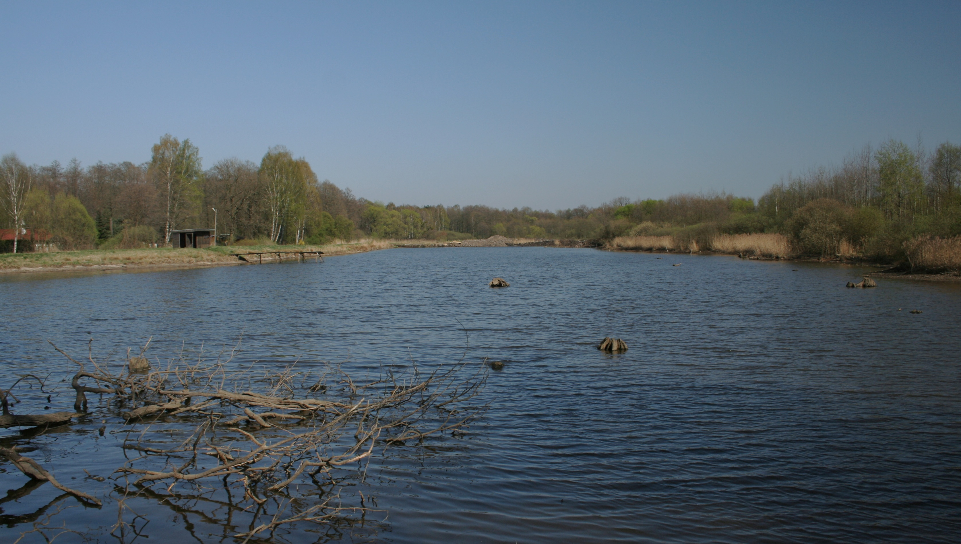 Staw (stary) w przysiółku Doły, gmina Boronów